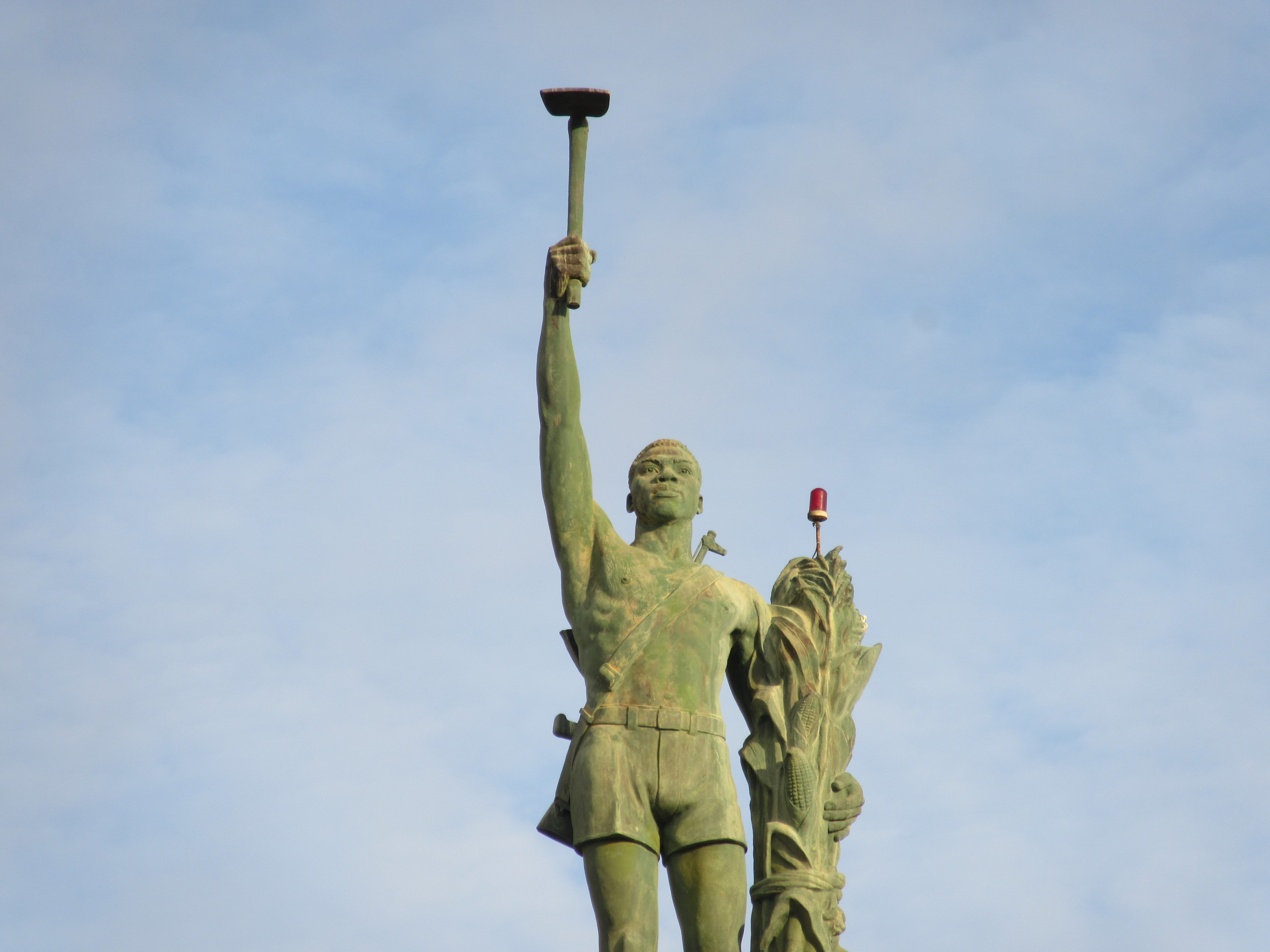 Place de l'Étoile rouge A Cotonou, la place de l’Etoile Rouge de Cotonou est l’une des plus marquantes de l’histoire socio-politique du Bénin. Située en plein cœur de la ville capitale économique du pays, elle est un véritable monument, symbole de l’adhésion du régime révolutionnaire à la doctrine « marxiste-léniniste » en octobre 1974. Comme vous l’aviez demandé, vous trouverez dans cet article l’histoire de cette place et ce à quoi elle sert dans la vie courante des Cotonois. Wikidata has entry Q25384162 with data related to this item.